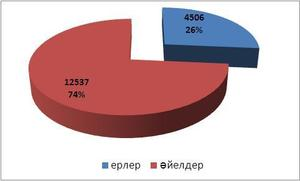 Оқырмандардың жыныстық құрамы (Л.Н.Толстой атындағы Қостанай облыстық әмбебап ғылыми кітапхана)